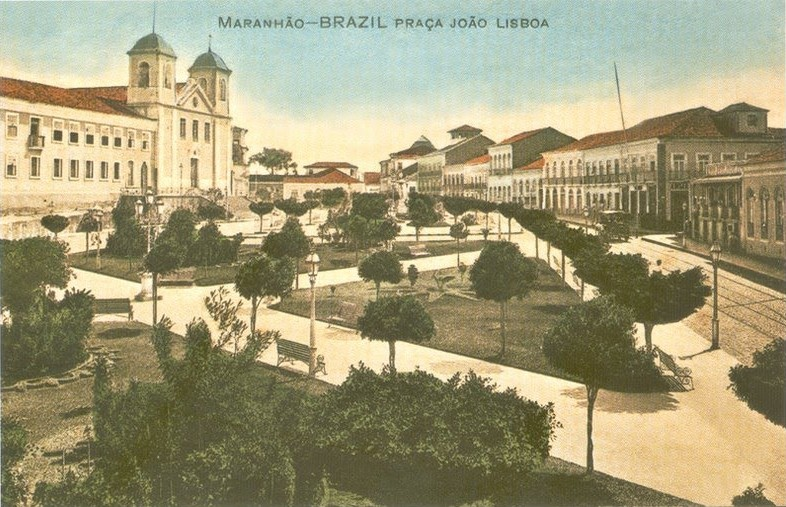 Cartão postal representando a Praça João Lisboa, em São Luís.